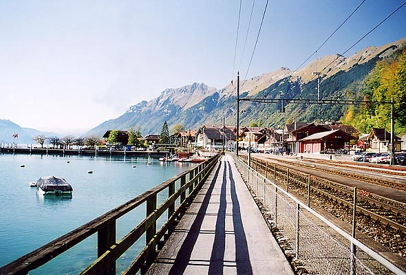 Brienz, Bahnhof